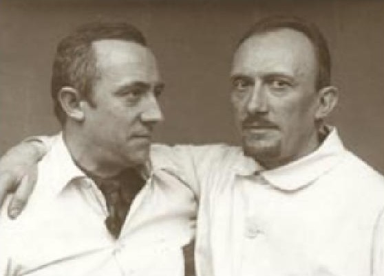 Josef Boháč (1890-1978), český sochař